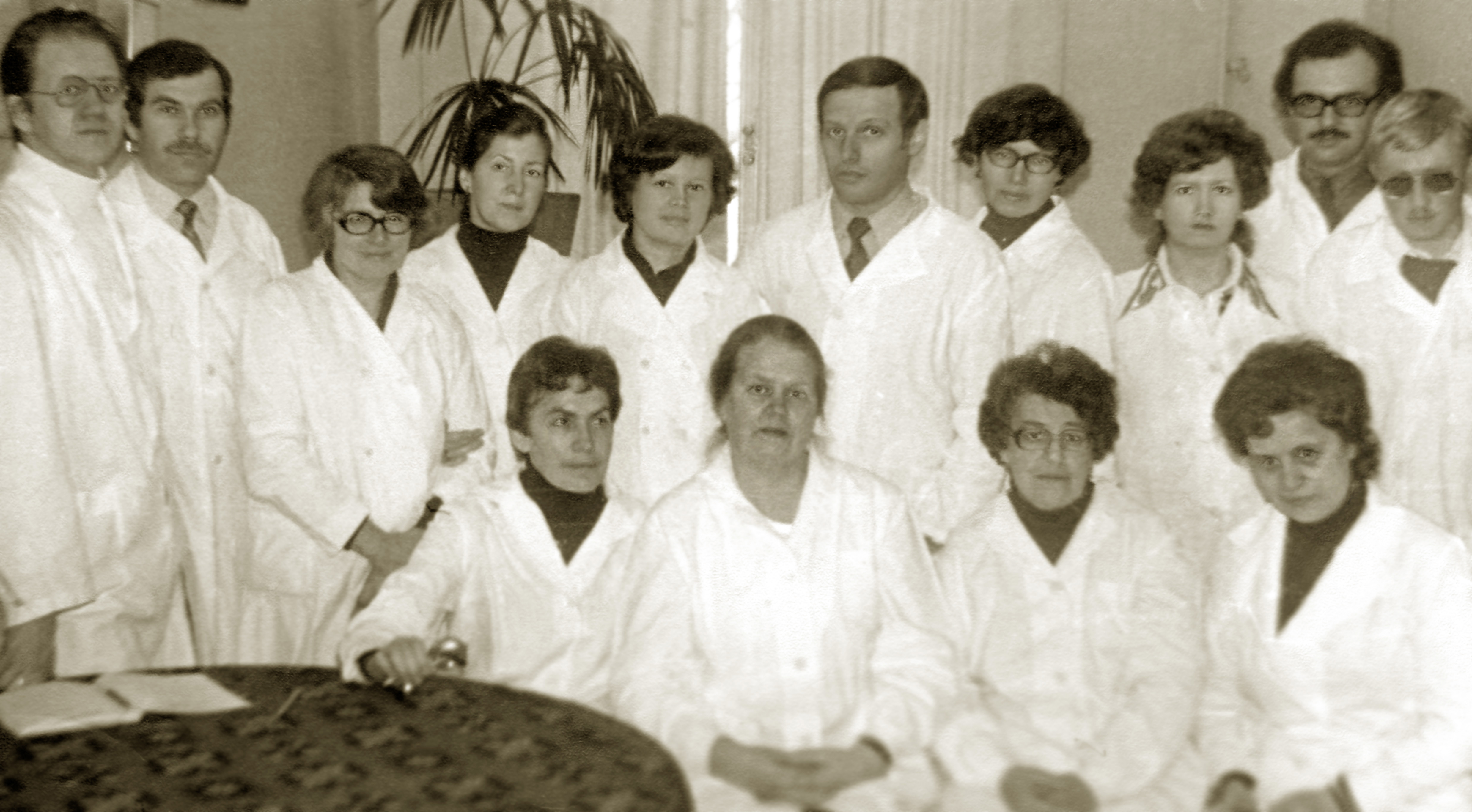 Сотрудники кафедры Фармакологии Ленинградского педиатрического медицинского института во главе с профессором Ириной Валерьевной Марковой